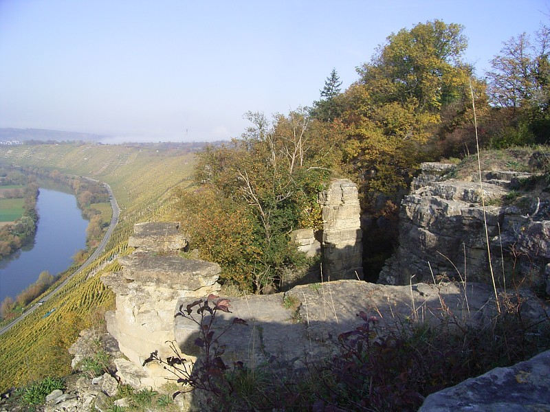 Die Hessigheimer Felsengärten, aufgenommen mit einer Ricoh Caplio Rx.